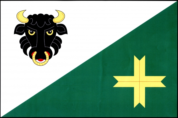 vlajka, Číhalín, okres Třebíč